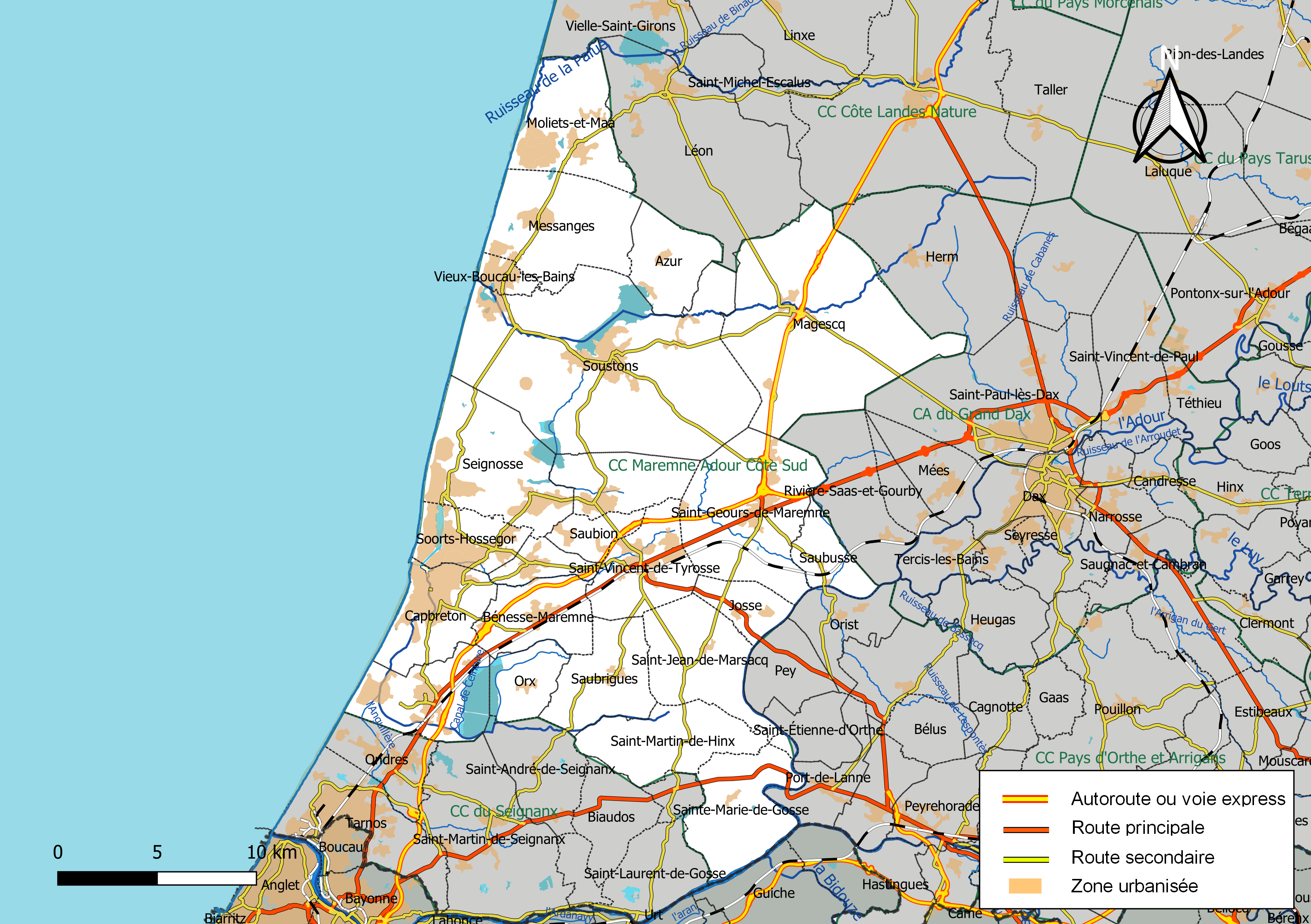 Carte géographique de la Communauté de communes de Maremne-Adour-Côte-Sud, département des Landes, France. Composition au 1er janvier 2019.